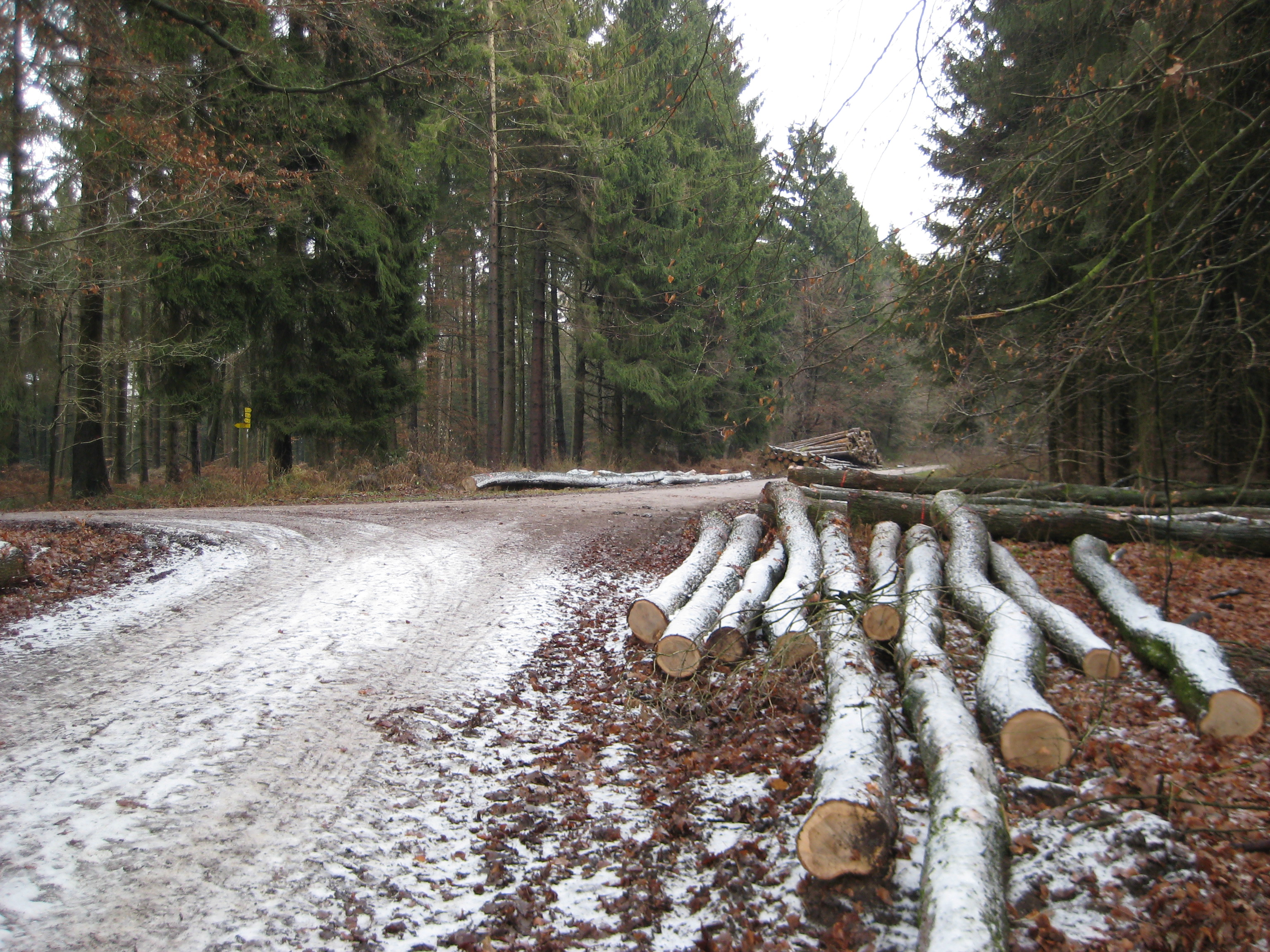 Forstweg am Gipfel des Limbergs im Teutoburger Wald im Gebiet von Bad Iburg und Hilter am Teutoburger Wald im Landkreis Osnabrück (Niedersachsen). Hinweis: Den Namen Limberg tragen weitere Berge, neben anderen der im Stadtteil Dodesheide in Osnabrück, aber auch andernorts